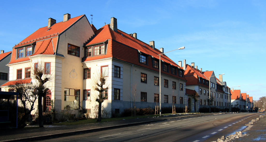 Lindern haveby, Geitmyrsveien 62-68, Oslo. Bygd 1917-1919. Boligtilsynets arkitektkontor ved Harald Hals.